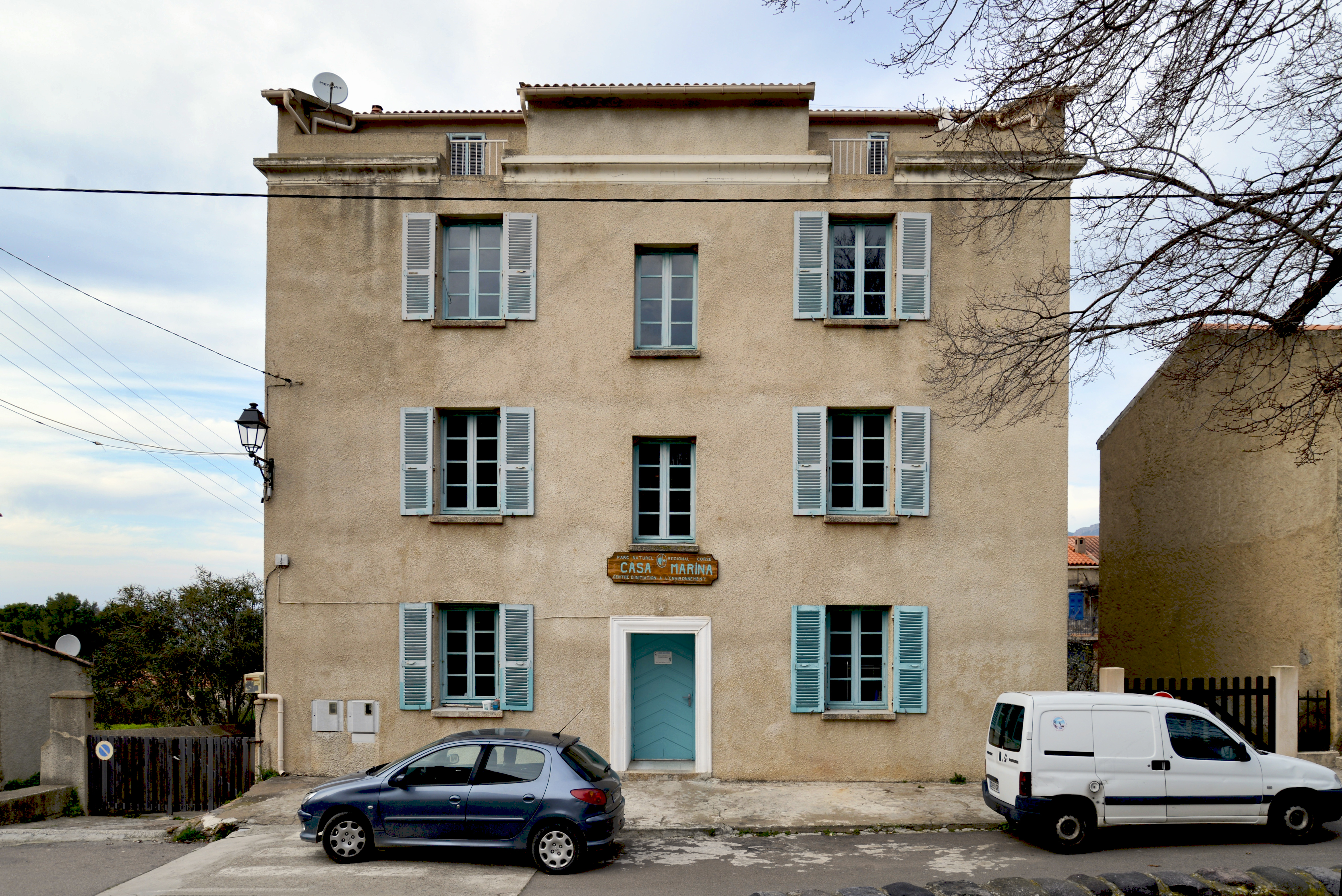 Galéria, Filosorma (Haute-Corse) - La Casa Marina du parc naturel régional de Corse, située au cœur de la réserve de biosphère